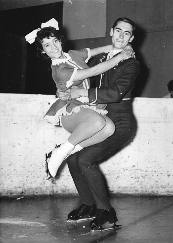 Irene Müller, Hans-Georg Dallmer Zentralbild Dressel 26.12.1960 Einen "bunten Weihnachtsteller" präsentierten die Eiskunstläufer der Eisrevue "Polarsterne" vom SC Dynamo Berlin am 26.12.1960 in der Werner-Seelenbinder-Halle den Berlinern. UBz: Irene Müller und H.G. Dallmer nach dem "Kußtanz".